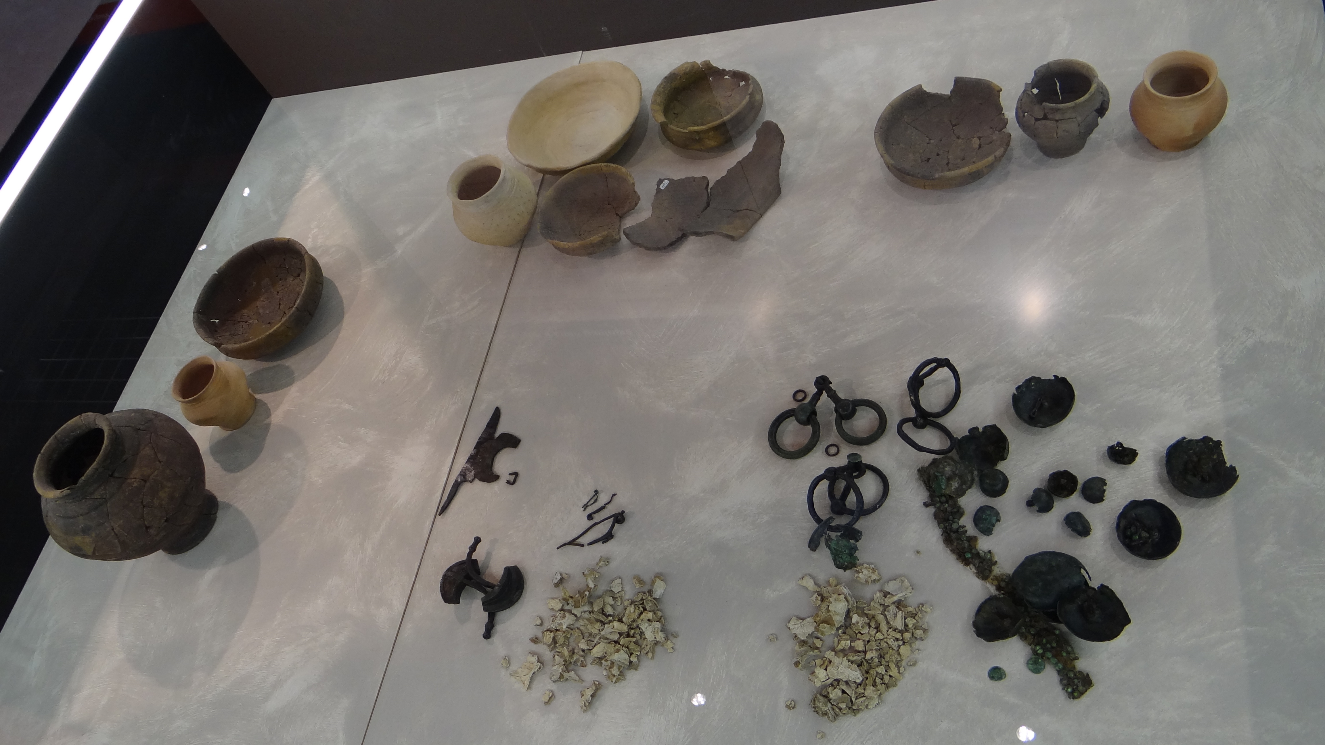 Archeos - Hordain - Tombe de la Tène